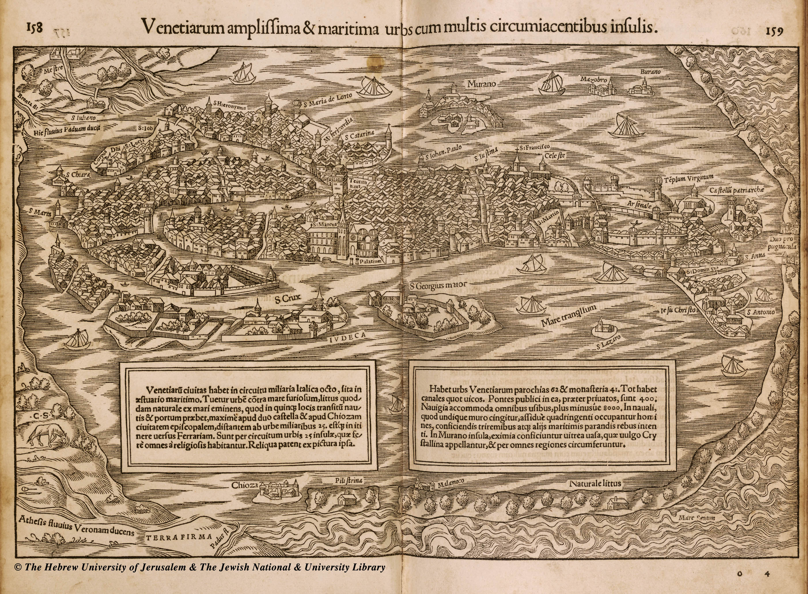 Venedig kurz vor 1550